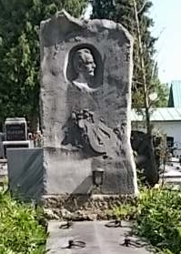 Hermann Winkelmann-Friedhof Mauer (10-2-3)